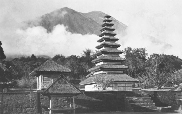 Foto. Meru op het tempelcomplex bij Besakih met de gunung Agung op de achtergrond